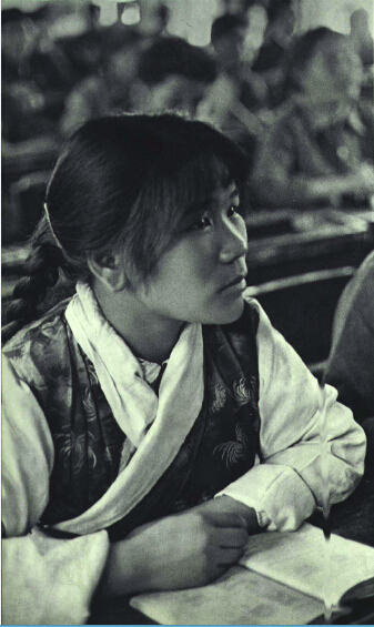 1966-01 1966年西北民族学院学生